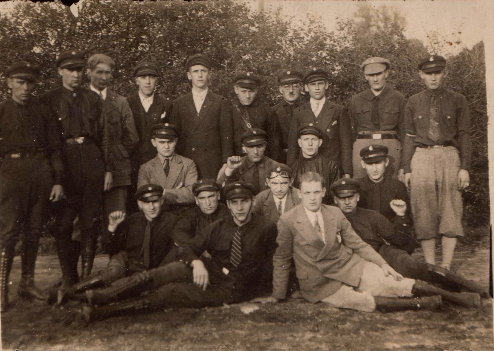 Roter Frontkämpferbund (RFB) Gronau (Westfalen) Ortsgruppe